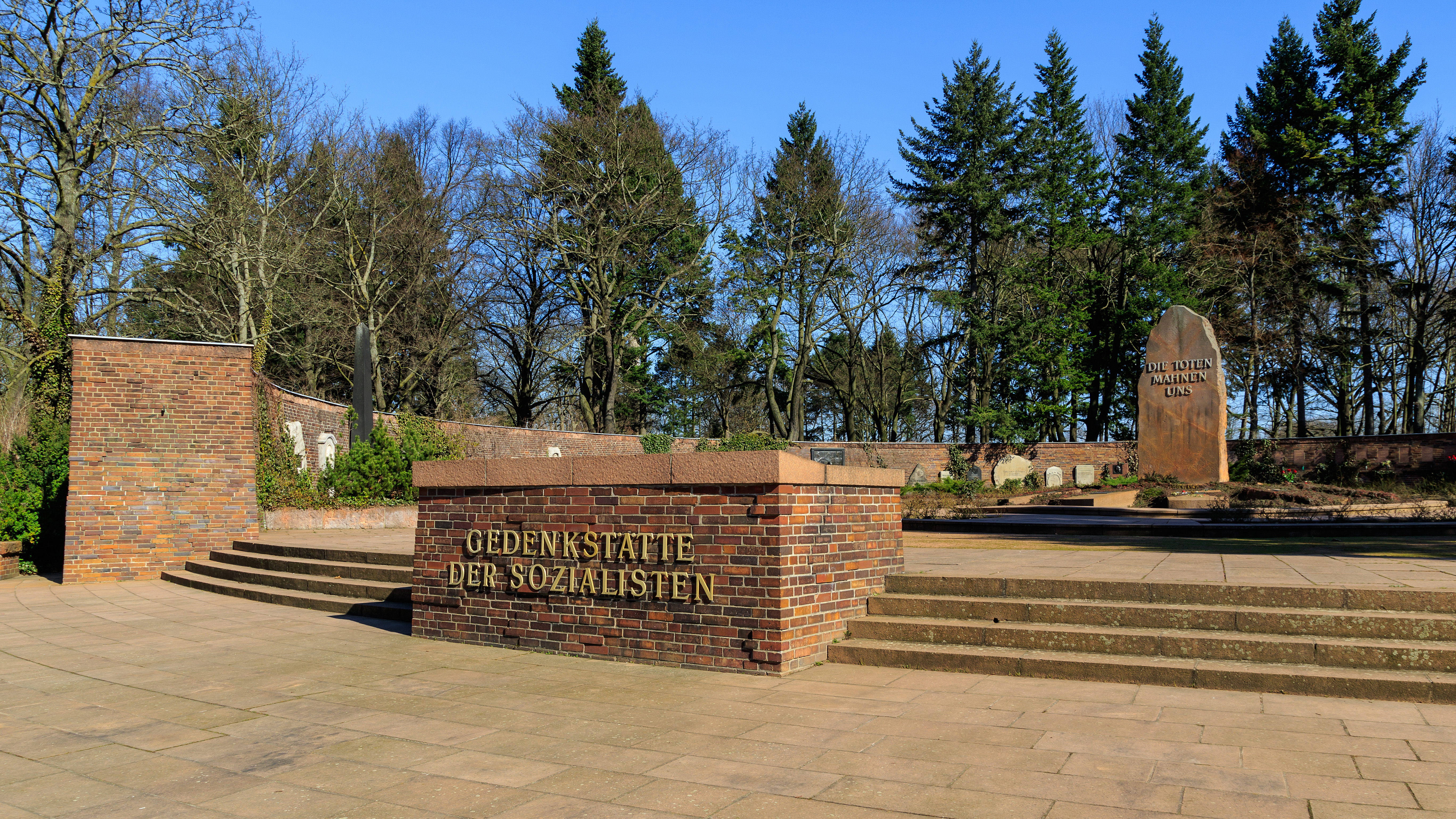 Zentralfriedhof Friedrichsfelde, Berlin-Lichtenberg. Gedenkstätte der Sozialisten, Mahnmal.